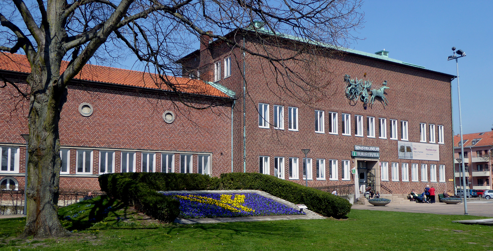 Ystads Konstmuseum, till vänster finns Ystads Turistbyrå. 20 april 2018.